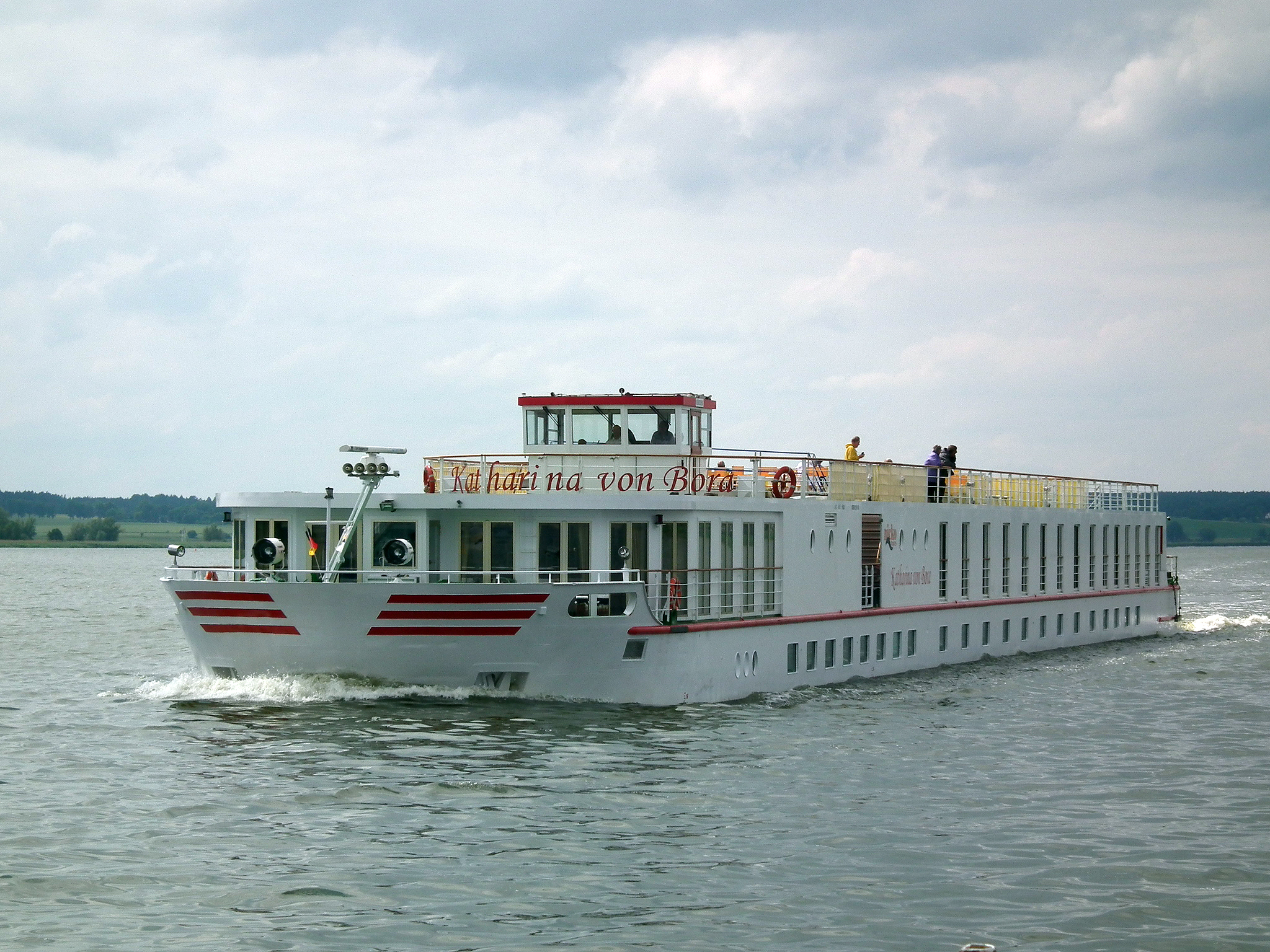 Kabinenschiff Katharina von Bora auf dem Peenestrom